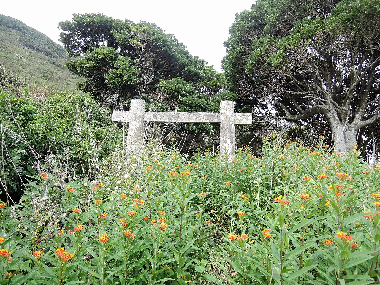 野崎島にある沖ノ神島神社山越え参道の鳥居